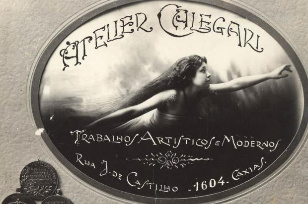 Imagem promocional do Atelier Calegari